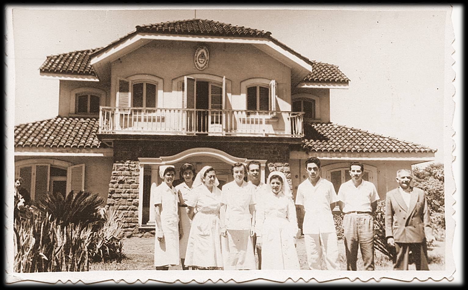 La Dra.Schwarz y el Staff de trabajo de aquella época 1955.